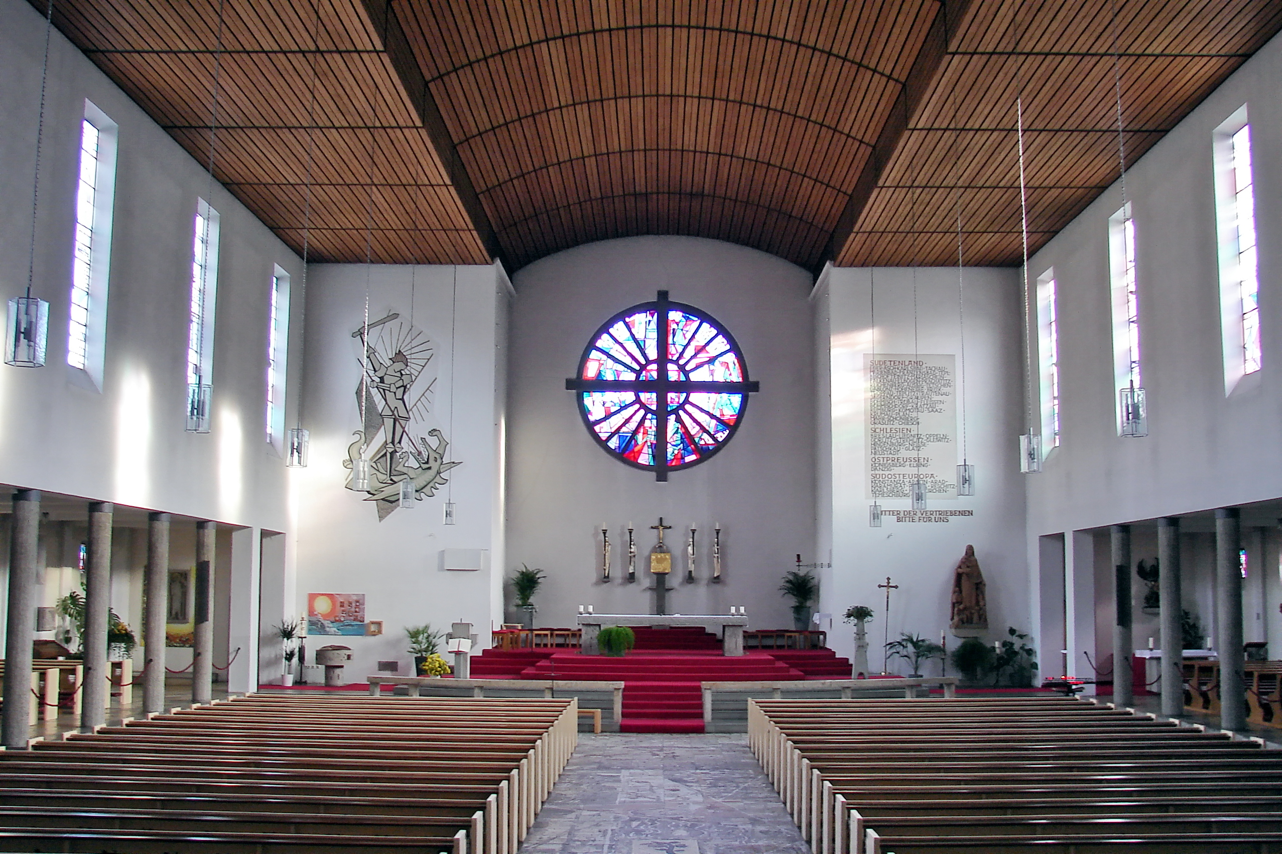 St. Michael ist eine denkmalgeschützte römisch-katholische Pfarrkirche am St.-Michaels-Platz 6 in der Stadt Neutraubling, Landkreis Regensburg, Bayern. Die weiße Kirche liegt am Ortsrand zur sogenannten Walhallastraße hin gelegen.